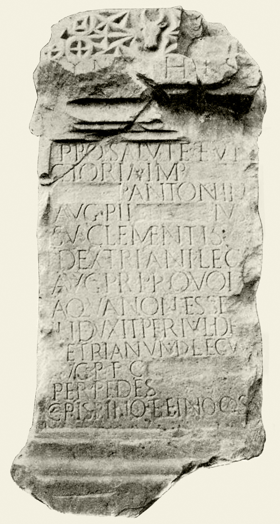 Westkastell Öhringen: Eine der Bauinschriften aus dem Brunnen der Principia; ein Altar für die Nymphen aus dem Jahre 187 n. Chr. [N]ym[p]his pro salute et Vi- ctoria Imp(eratoris) Com- modi Antonini Aug(usti) Pii Felici[s ] ius- su Clementis Dextriani leg(ati) Aug(usti) pr(o) pr(aetore) quod aqua non esse[t] induxit per Iul(ium) De- [m]etrianum (centurionem) leg(ionis) V[III] Aug(ustae) P(iae) F(idelis) C(onstantis) Commodae per pedes [...] Crispino et Aeliano co(n)s(ulibus)